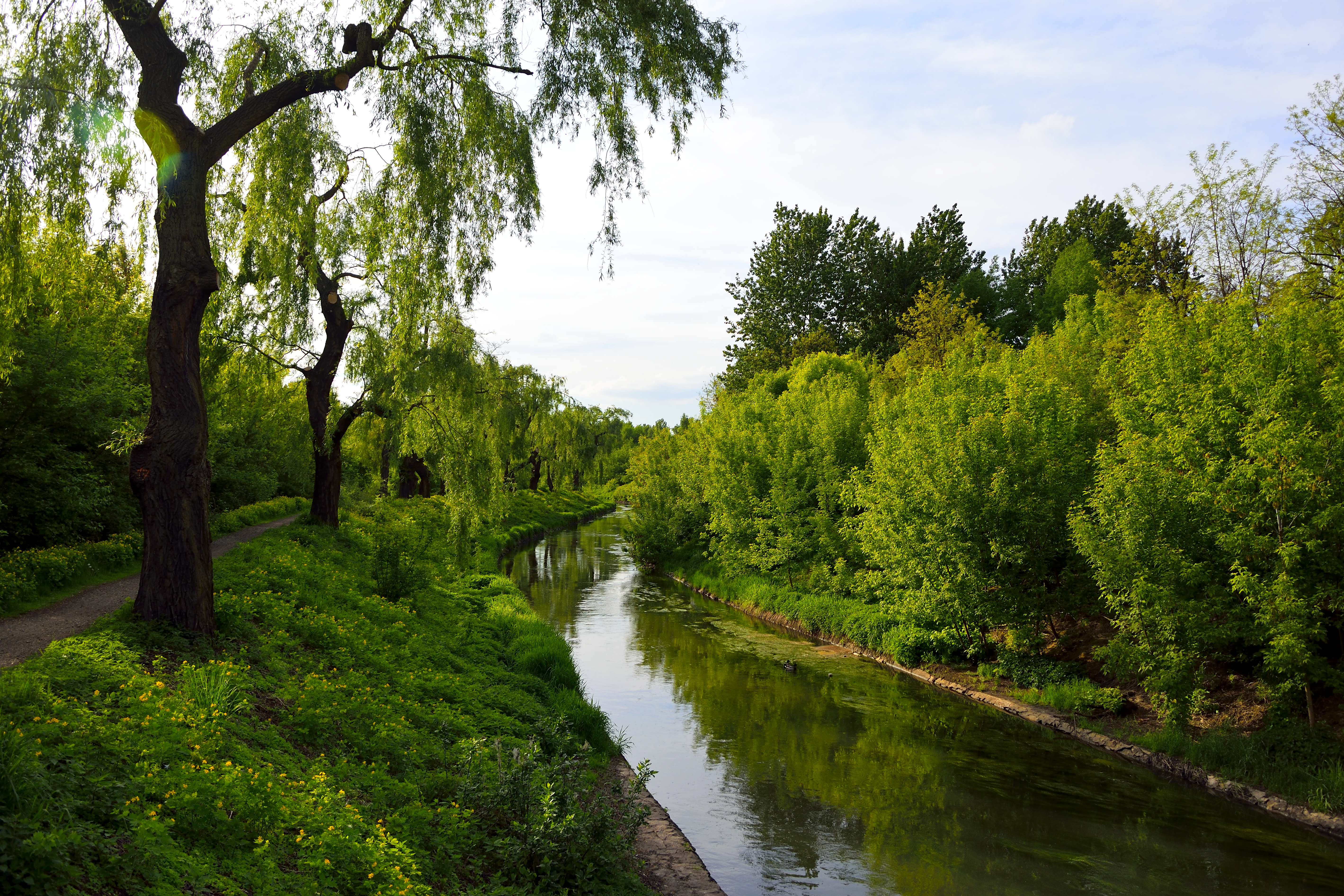 Rzeka Brynica na wysokości Stadionu Ludowego w Sosnowcu